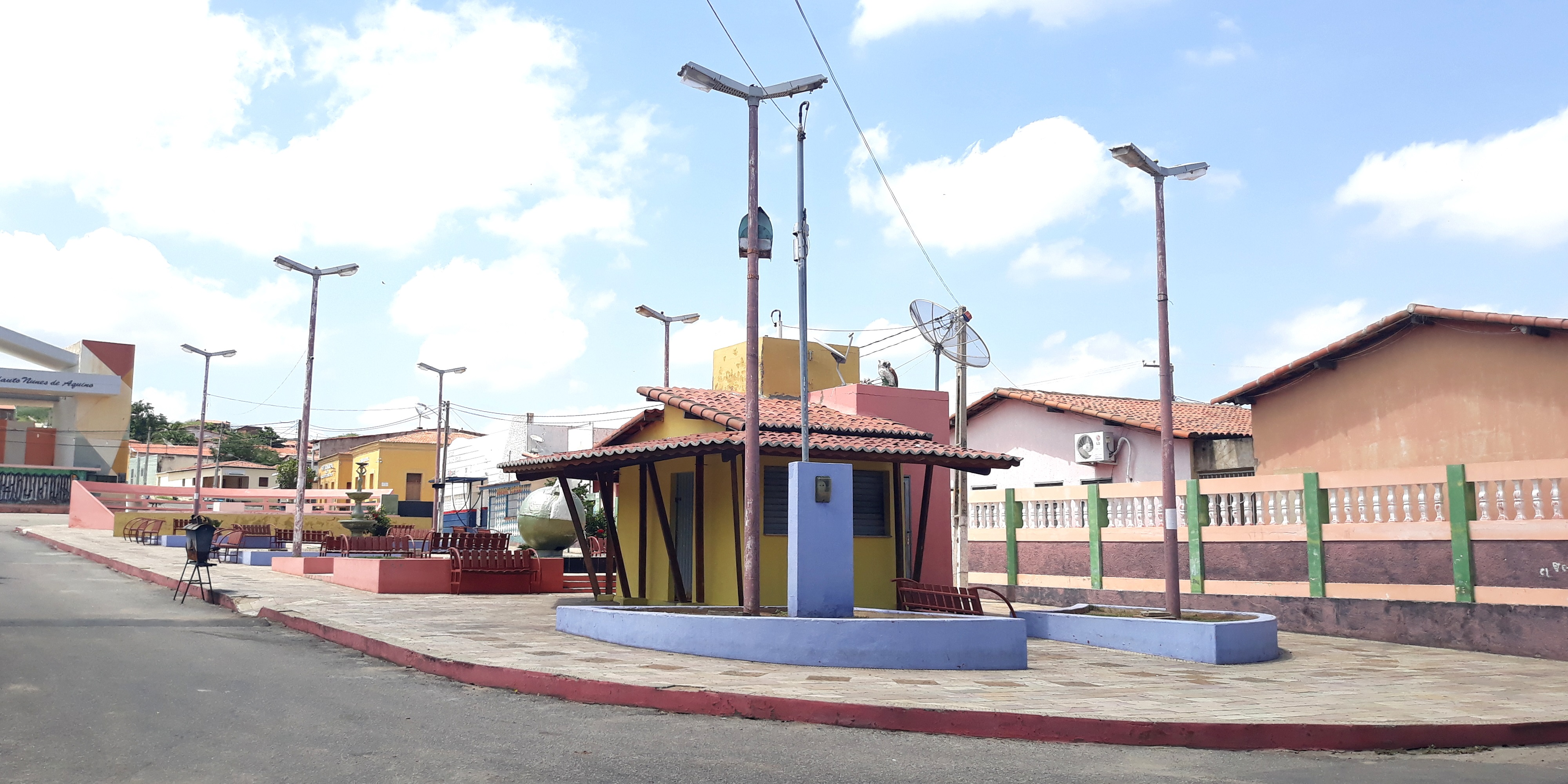 Praça Boa Esperança em Antônio Martins, Rio Grande do Norte, Brasil